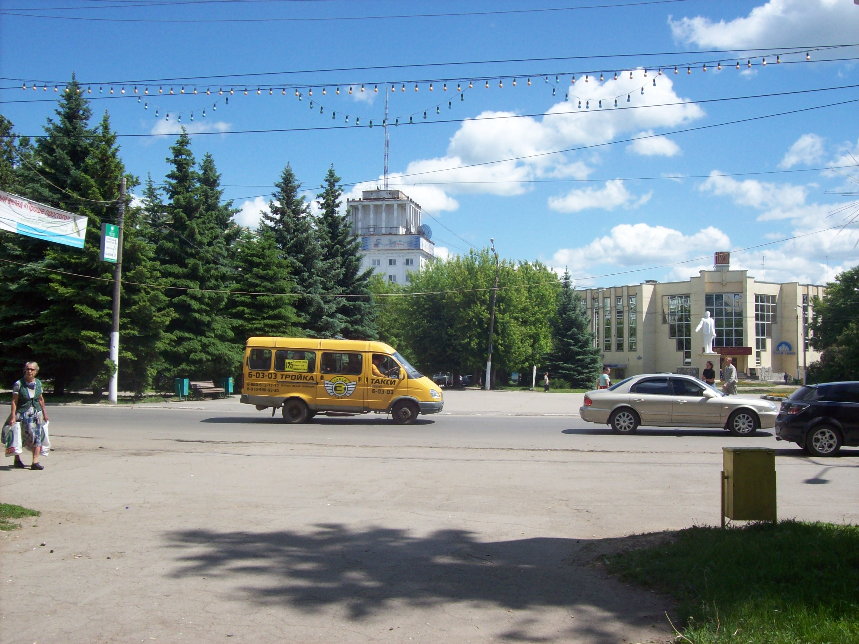 Жёлтое маршрутное такси № 125 на улице Московская, г.Новомосковск, Тульская область.